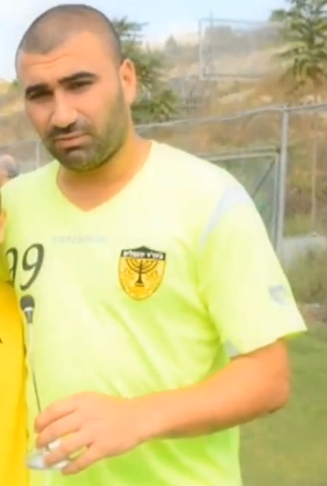 ערן לוי במדי בית"ר ירושלים 2012